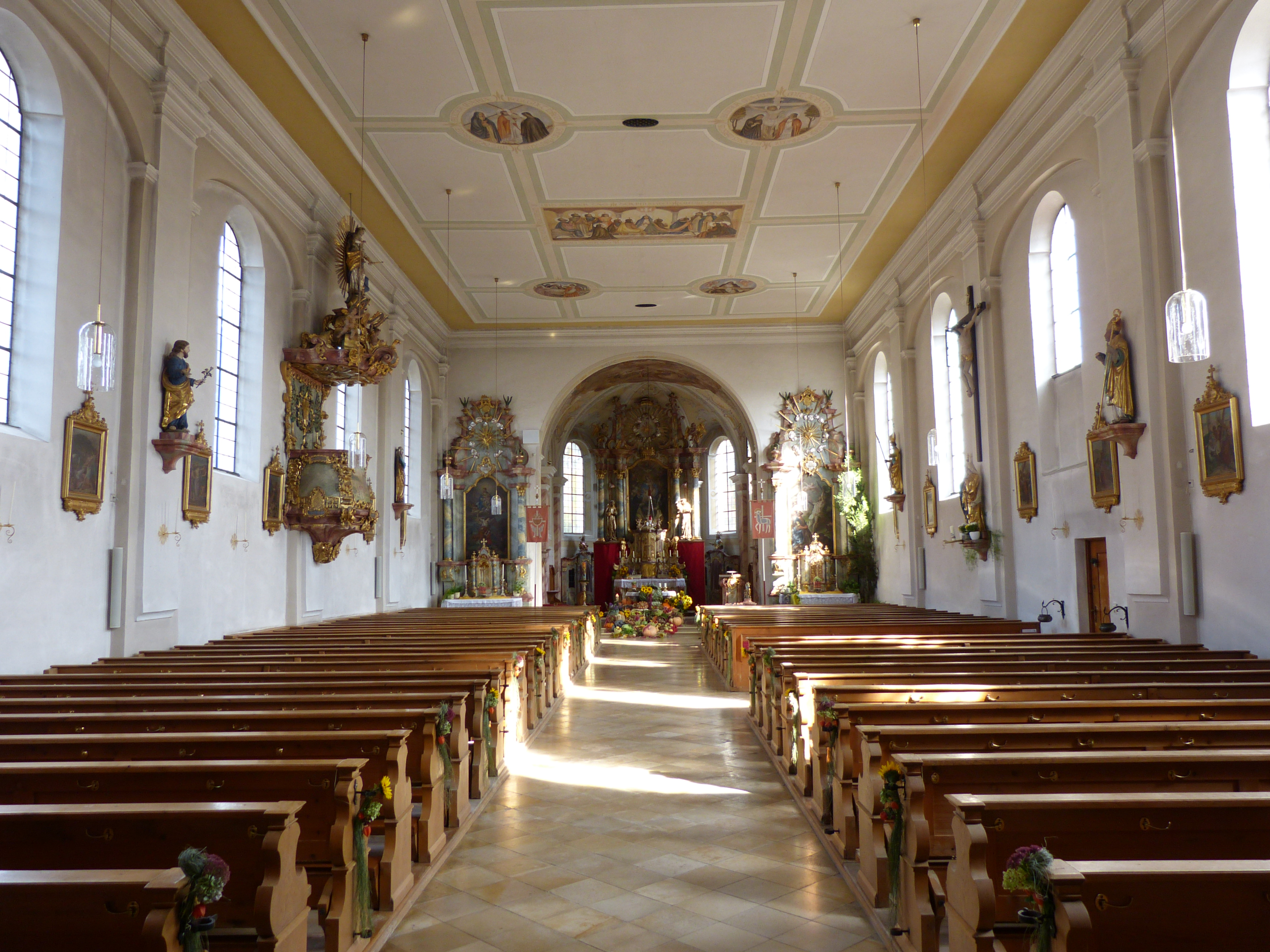 Mariä Himmelfahrt in Erkheim, Landkreis Unterallgäu, Bayern